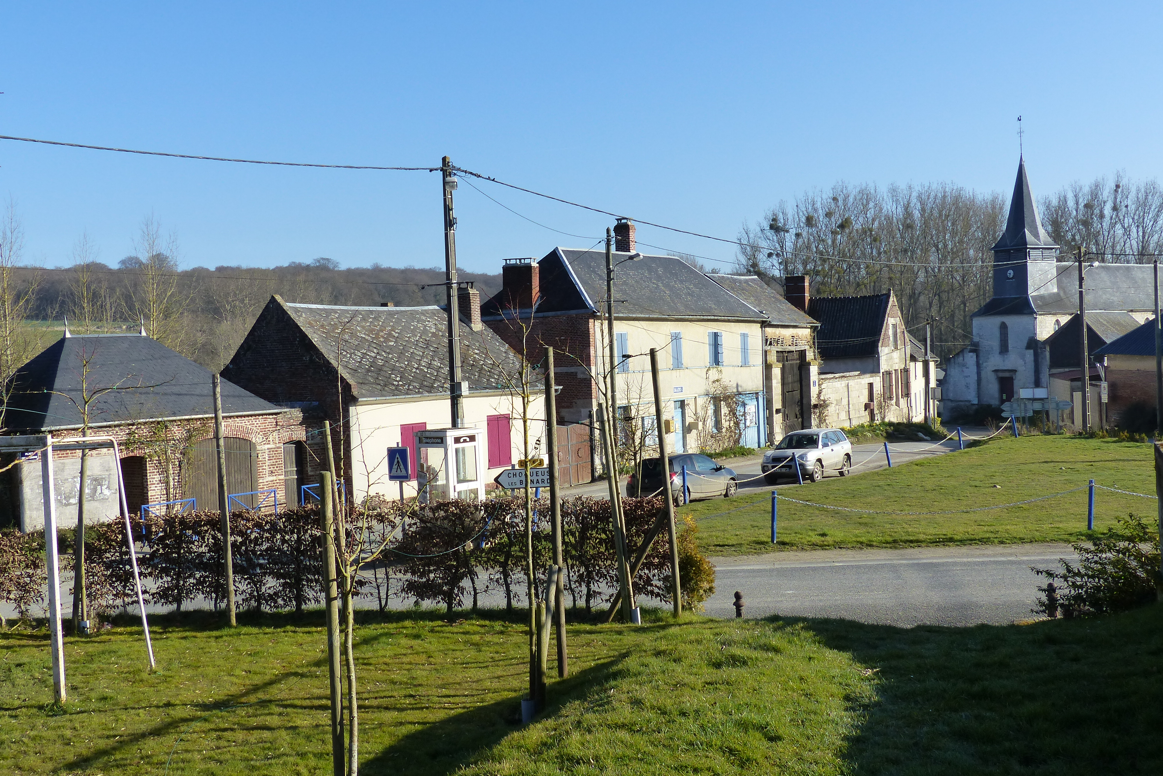 Vue générale de Catheux